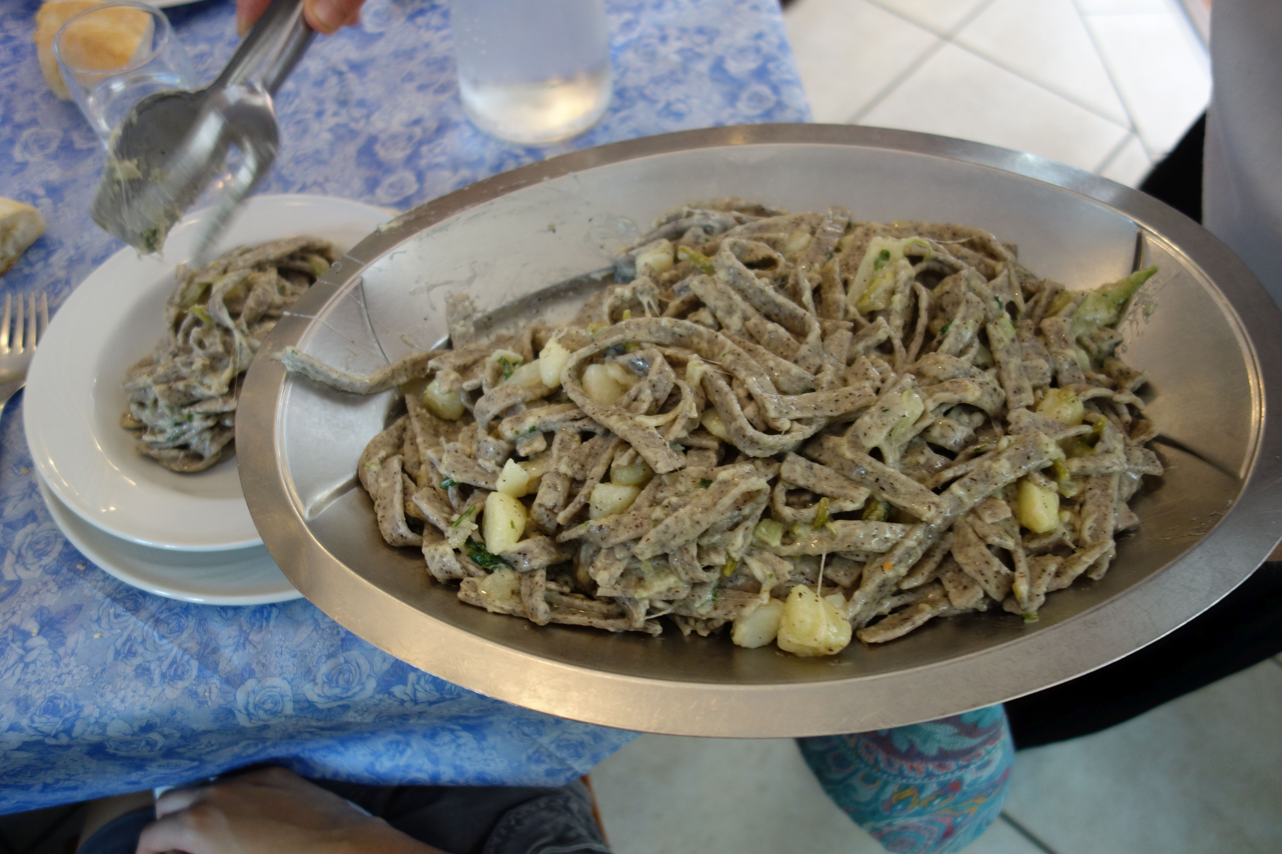 Esino Lario - pizzoccheri